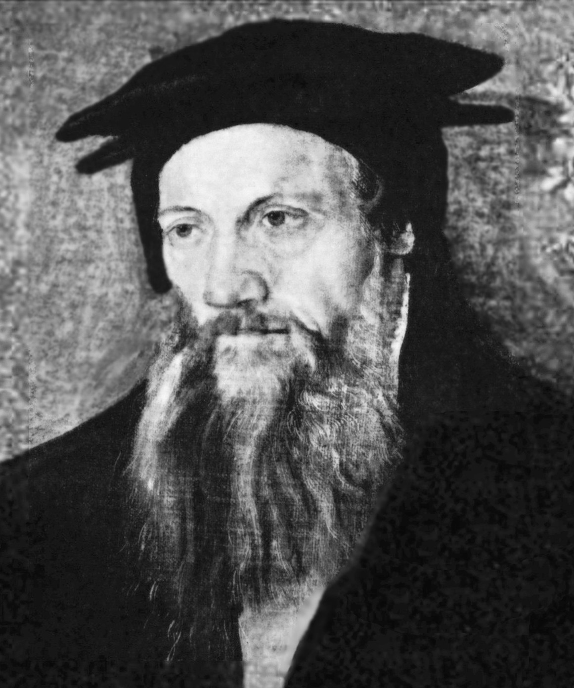 Conrad Gesner